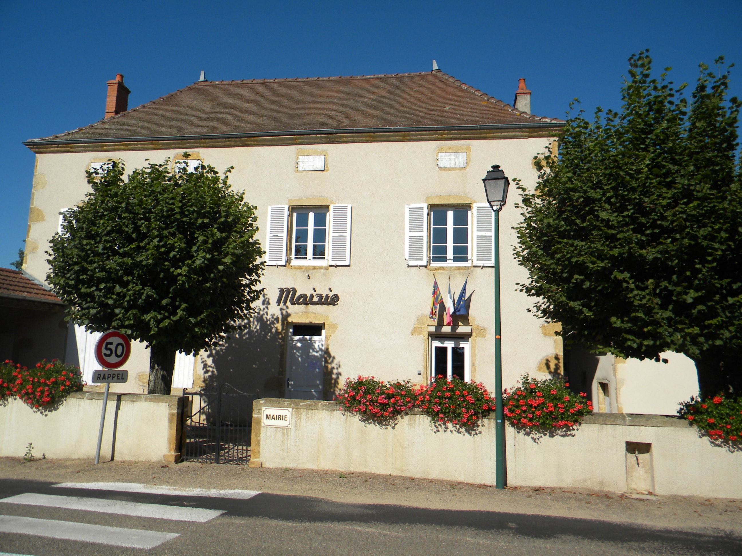 Baugy (Saône-et-Loire) Mairie